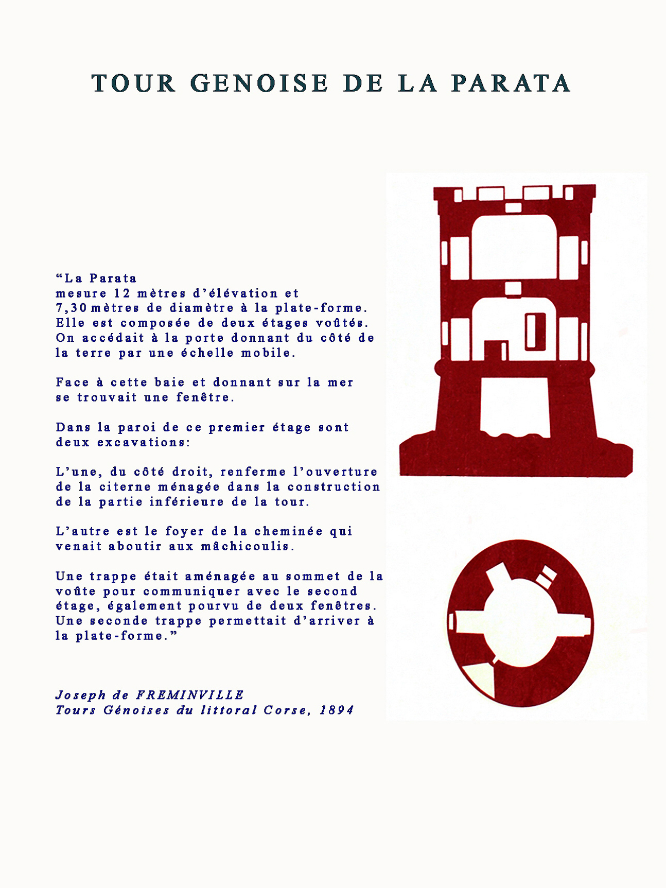 Ajaccio (Corse du Sud) - France, description et plan de la tour génoise de la Parata (1550).